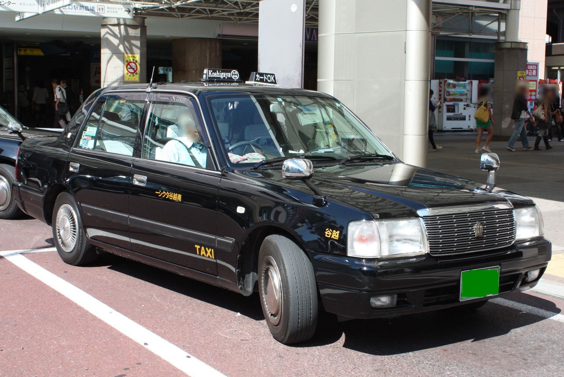 南越谷タクシー 南越谷駅南口にて